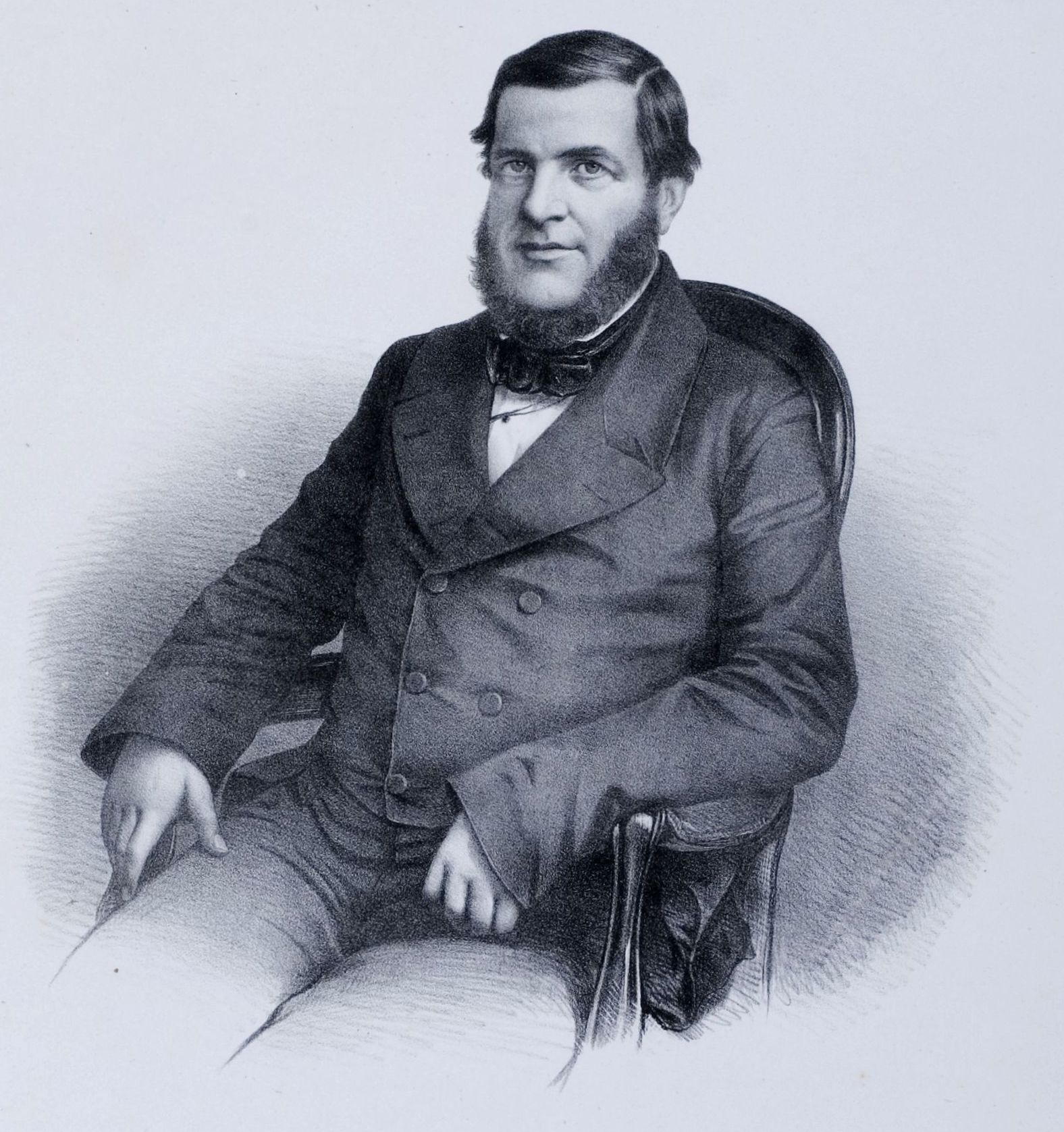 Litografia em preto e branco